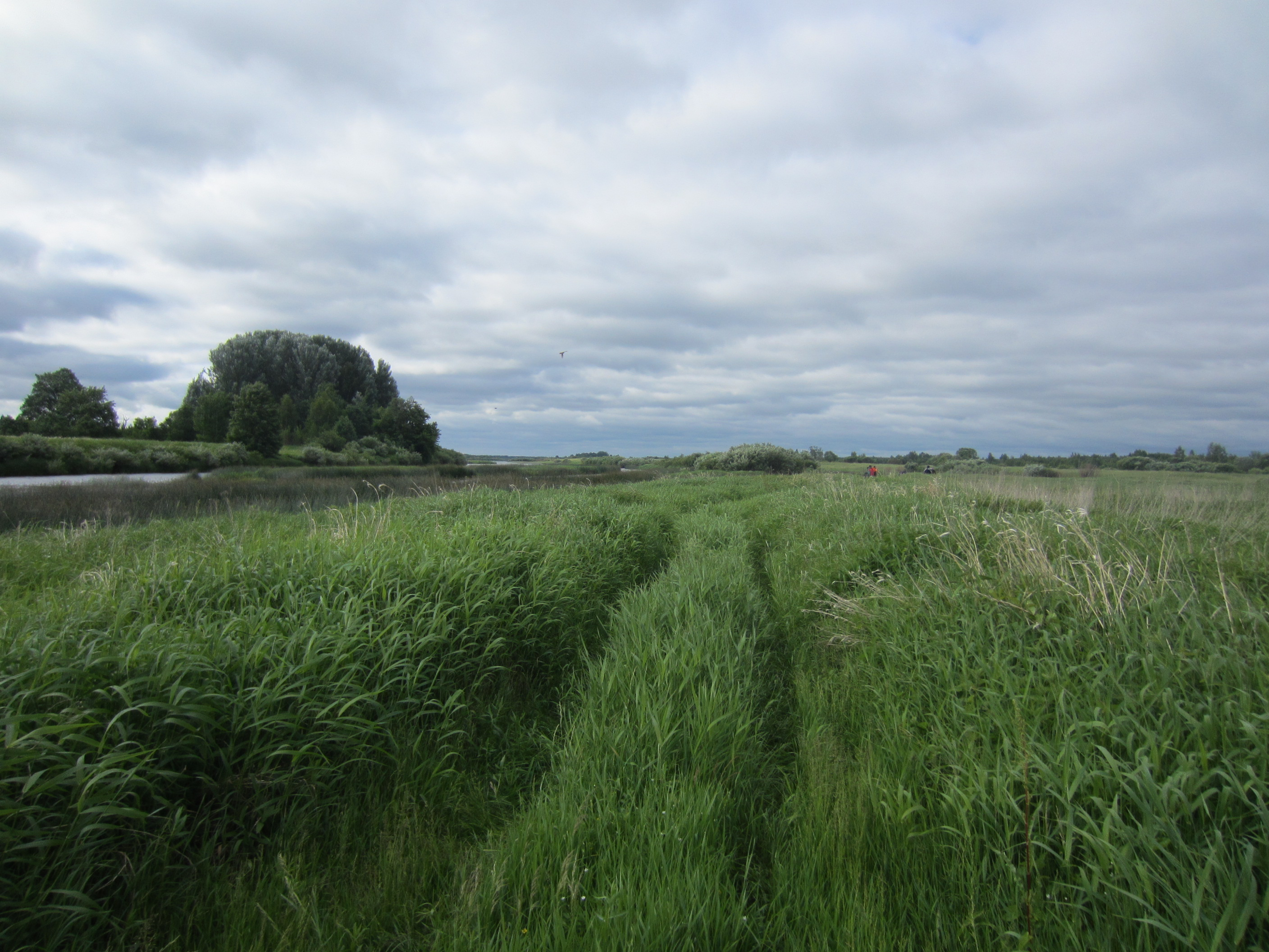 Palkinsky District, Pskov Oblast, Russia